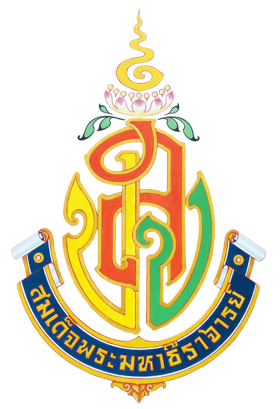 ตราสมเด็จพระมหาธีราจารย์ วัดยานนาวา